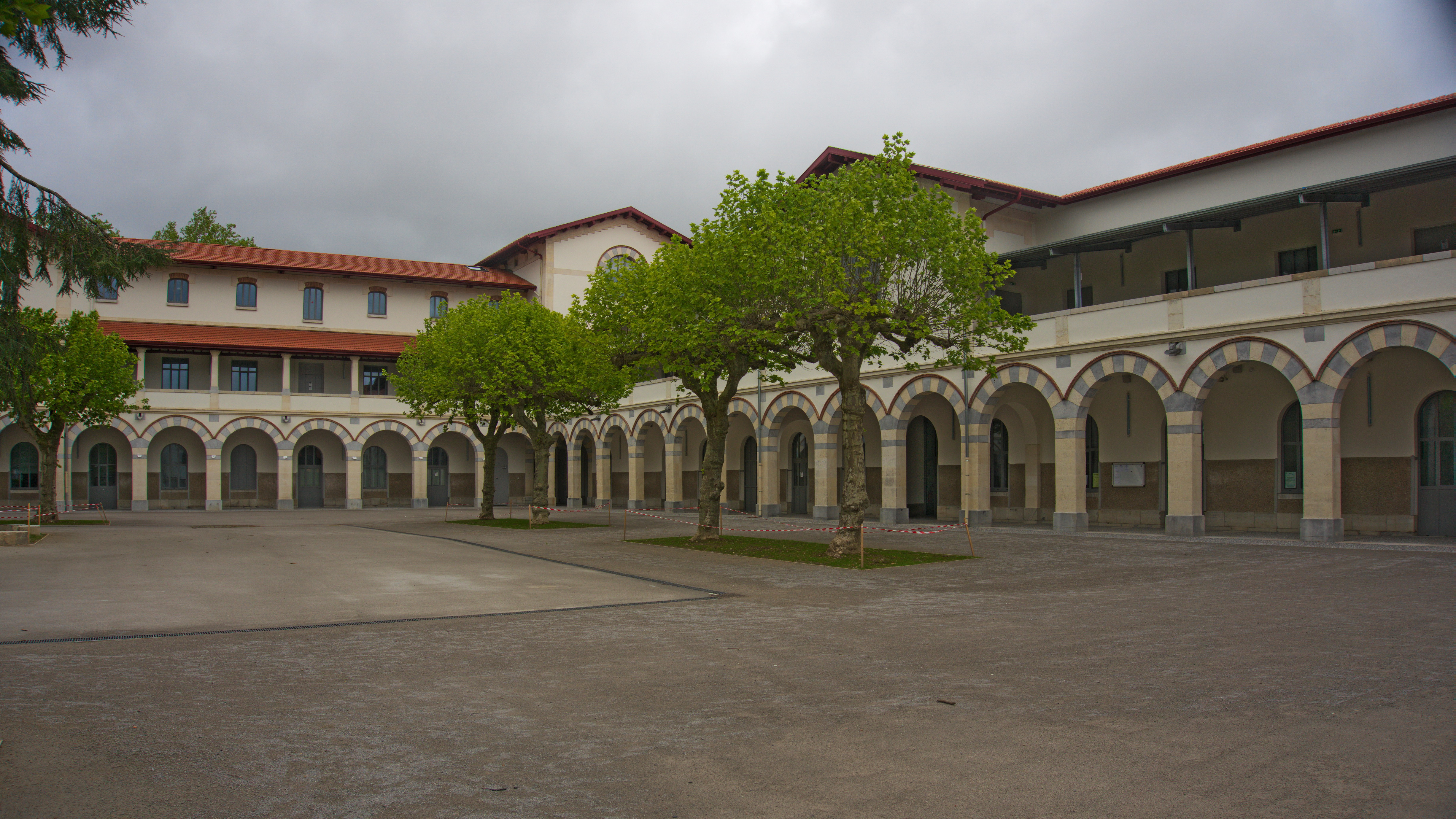 La cour du collège Marracq à Bayonne